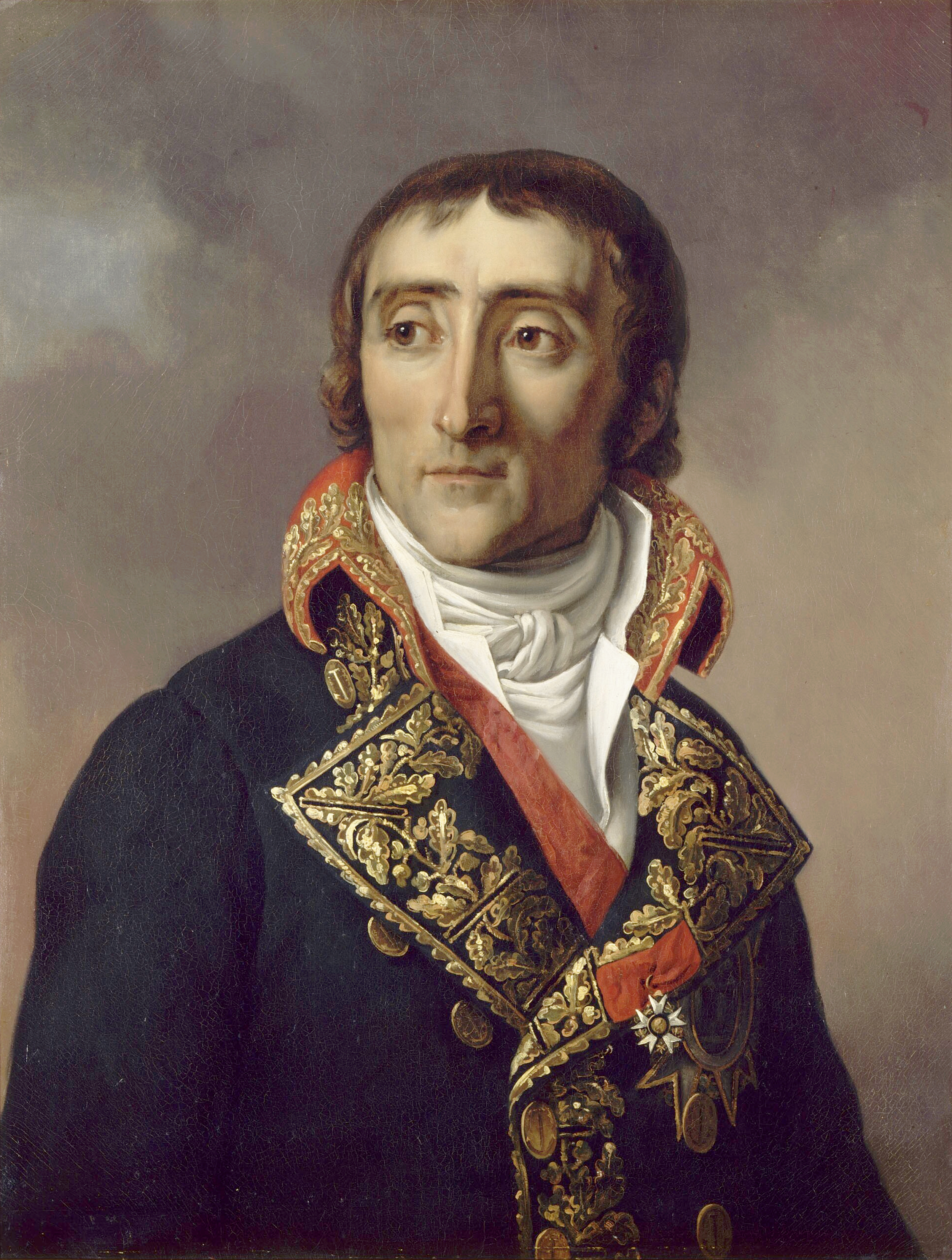 Portrait de l'Amiral Eustache Bruix